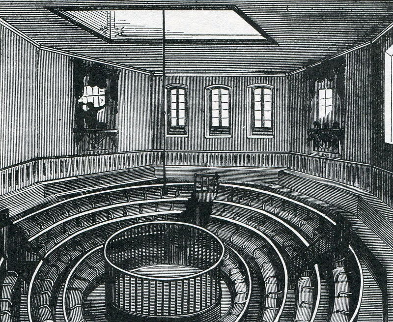 Grabado del interior del circo gallístico de Teresa de Córdoba, construido en un anexo a su palacete de la calle de Fernando el Santo, en Madrid. Inaugurado en 1858. Grabado aparecido en 1876 en la Guía de Madrid de Ángel Fdez. de los Ríos.